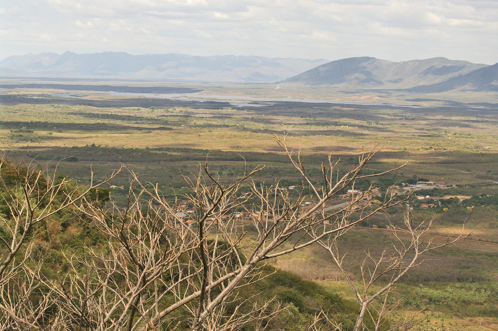 Depressão Sertaneja